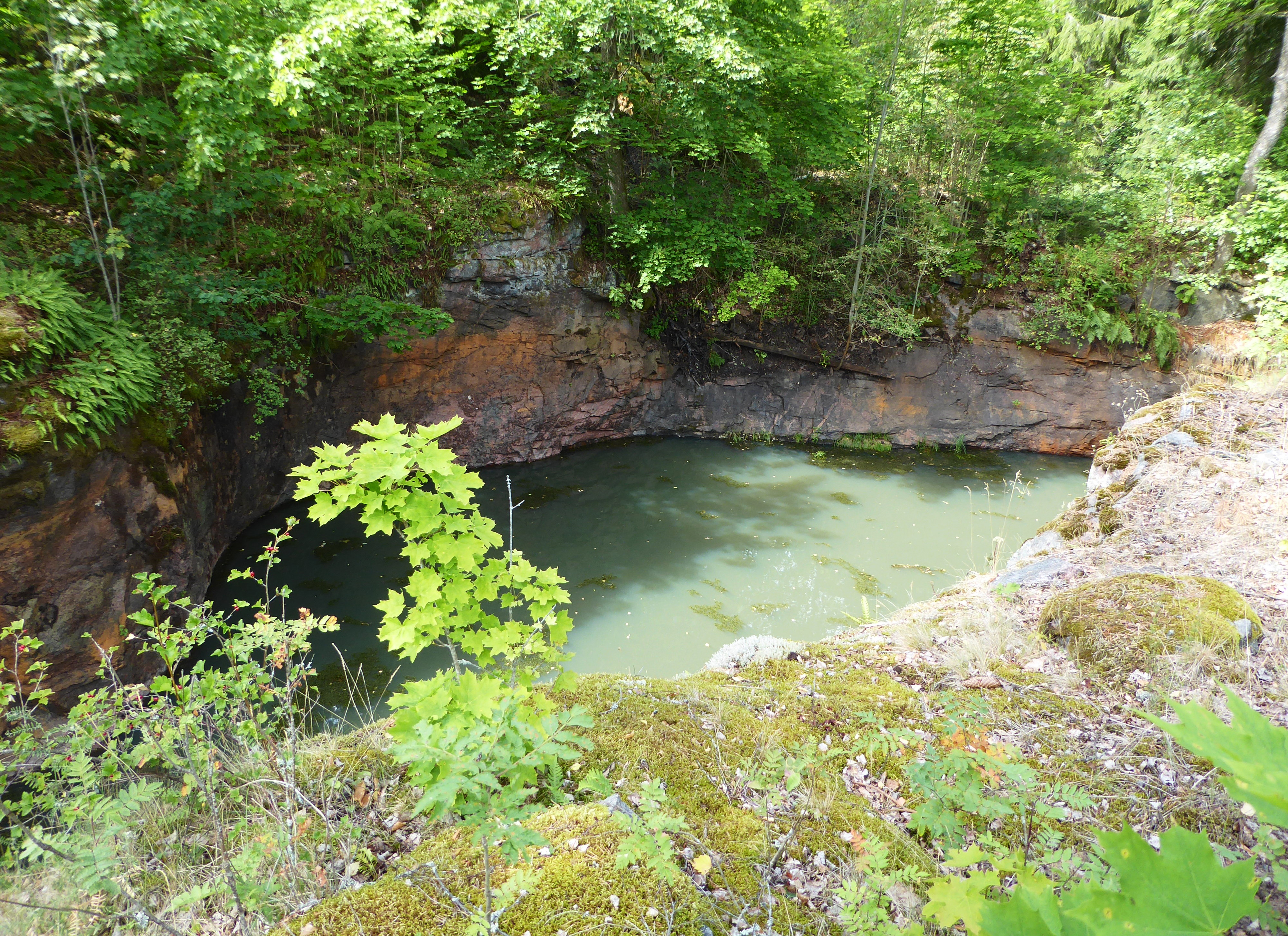 Skottvångs gruva gruvhål